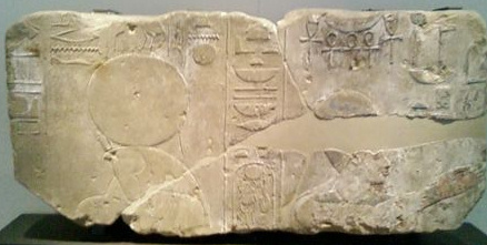 Bloc de Berlin, représentation de Aton Horakhty et Amenhotep IV